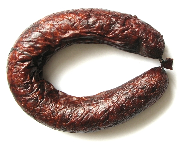 Sausage, Swojska, Polish, kiełbasa